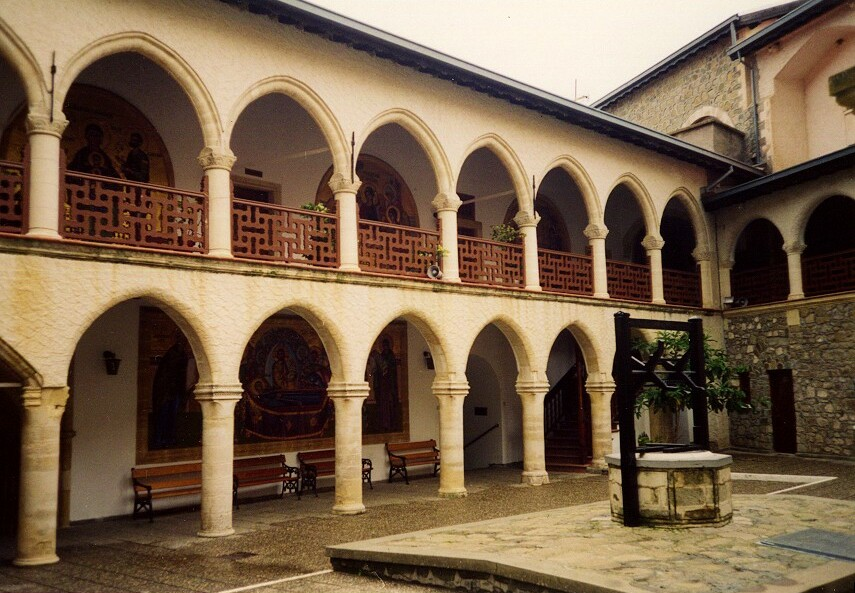 Monasterio de Kikkos. Patio interior. Troodos. Chipre. Imagen tomada por el cargador. Año 1998.